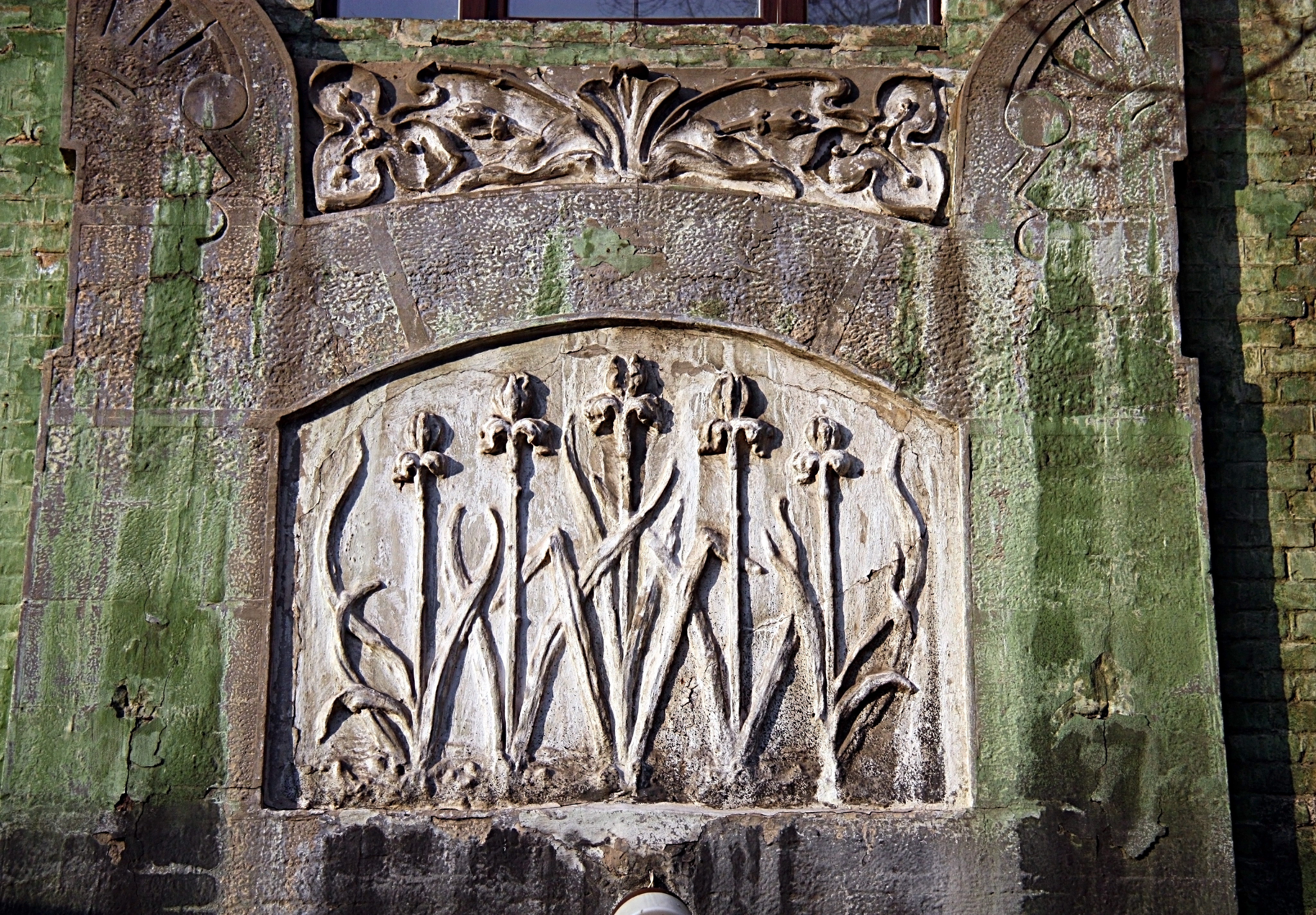 Особняк, де у 1924-1925 рр. викладав у школі С. В. Васильченко, письменник. 1910. Київ, Юрія Іллєнка вул., 8